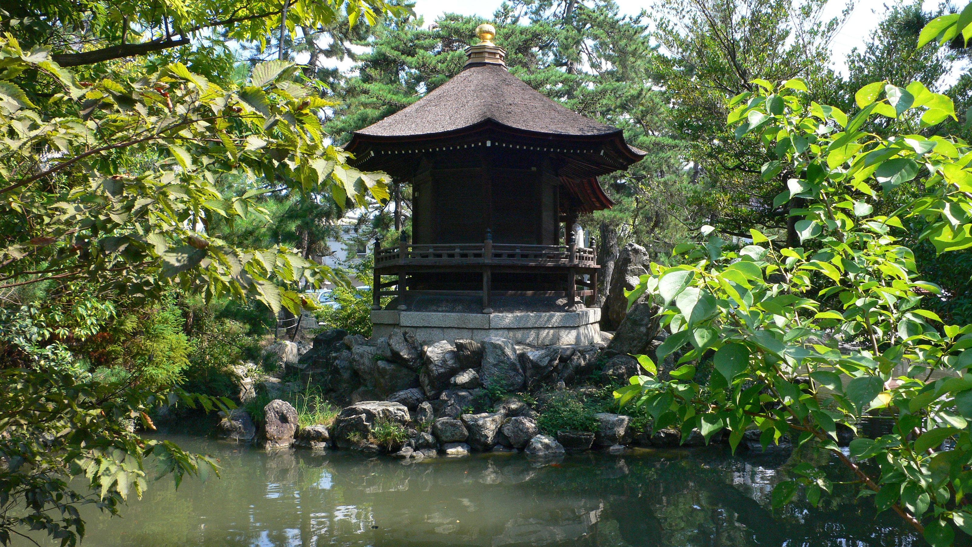 Nagahama-hachimangu in Nagahama, Shiga, Japan